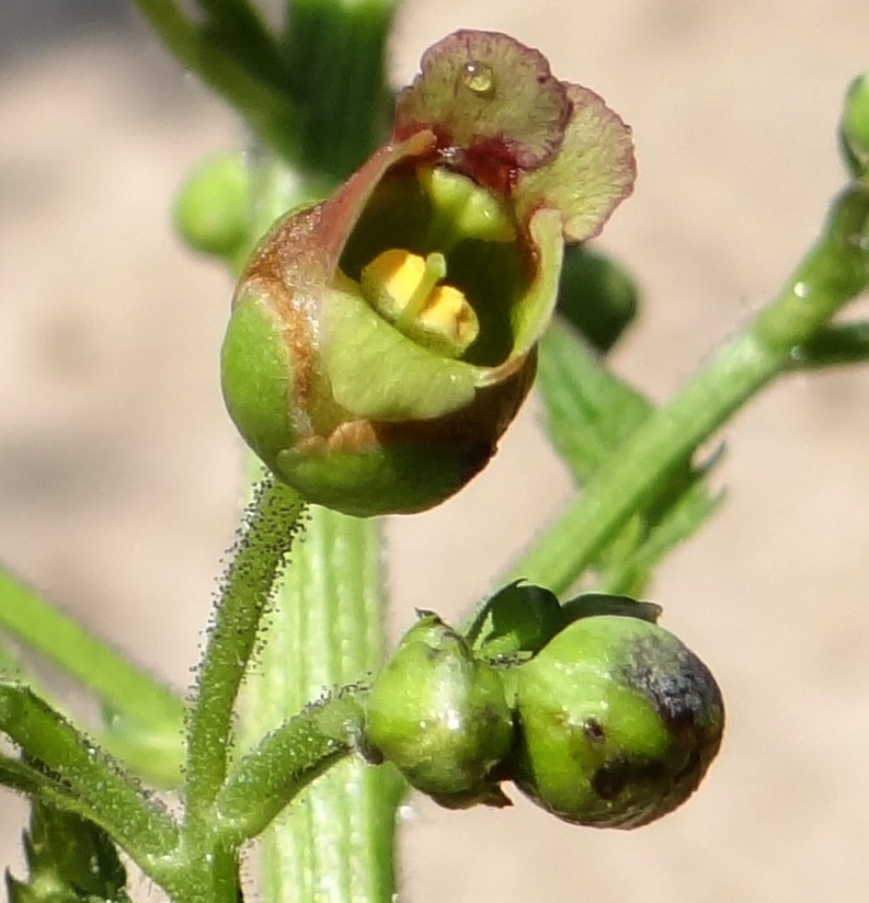 Scrophularia nodosa (location: Slovakia, Góry Choczańskie, Wielki Chocz)